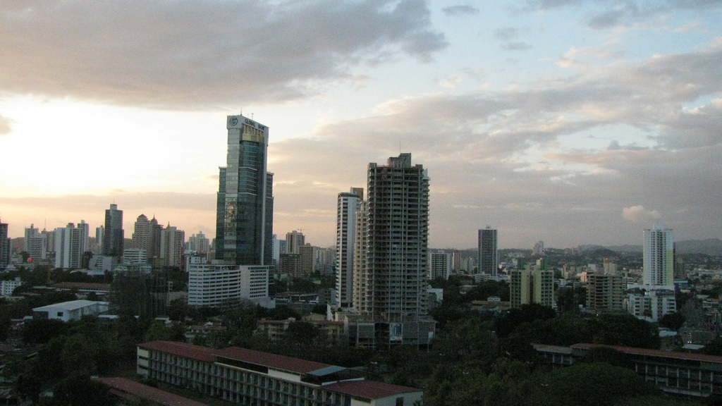 Parte de la ciudad de Panamá, 2009.